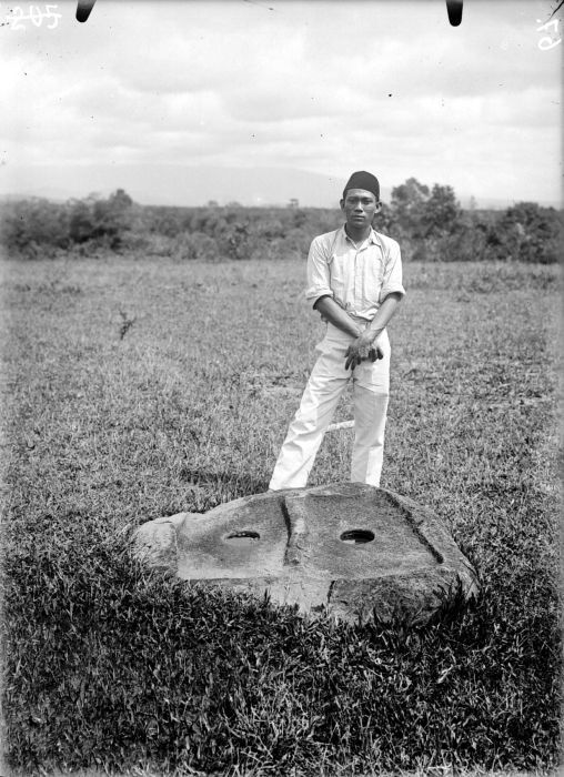 Negatief. Man poseert bij een megalitische vijzel in de buurt van Tebingtinggi